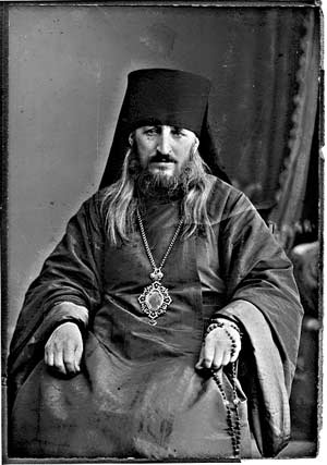 Варнава (Накропин), архиеп. Тобольский. Фотография. 10-е гг. XX в. (РГИА)